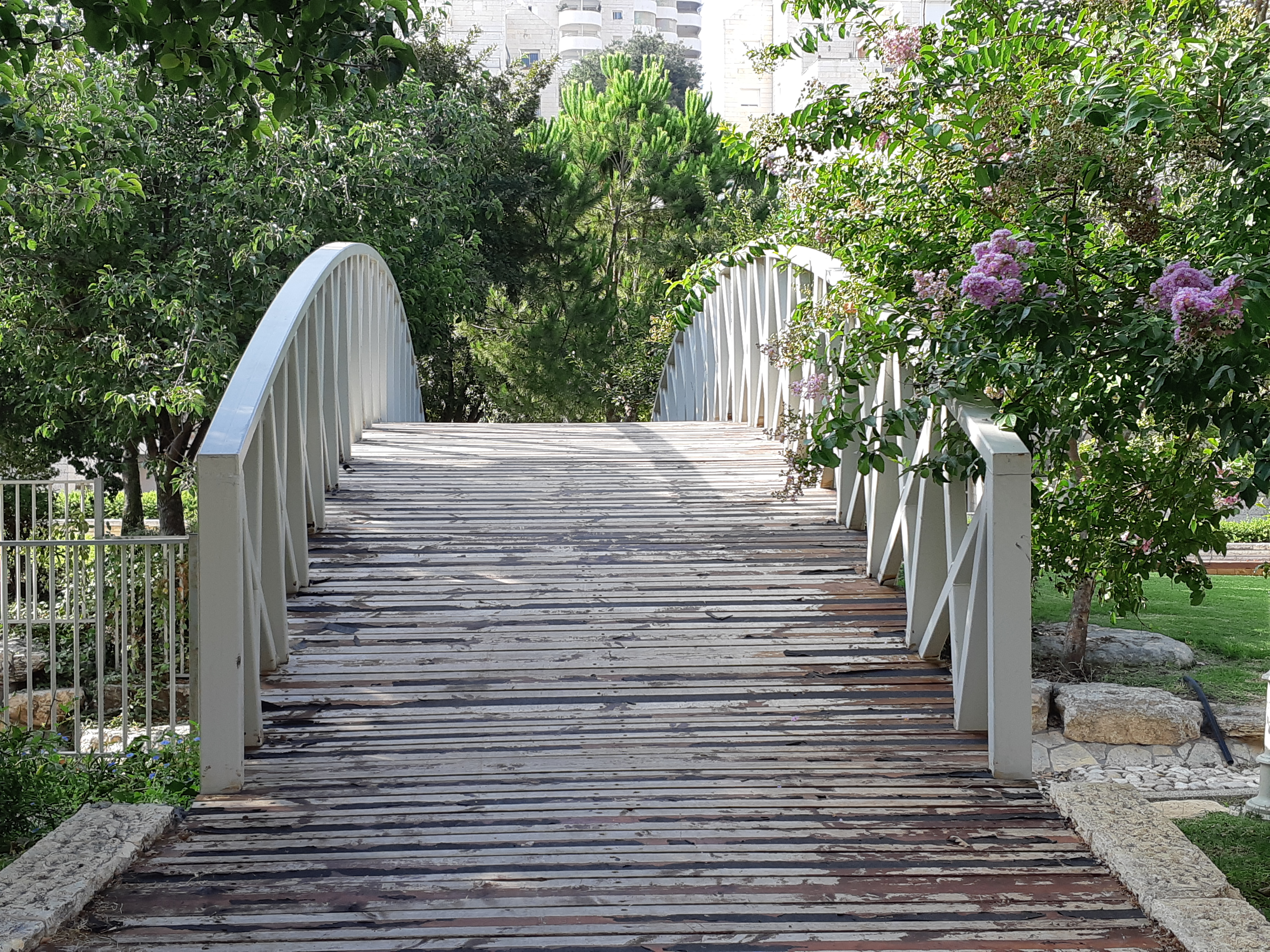 גשר בגן "הנחל הרטוב" בקצה המערבי של הרחוב עמק איילון